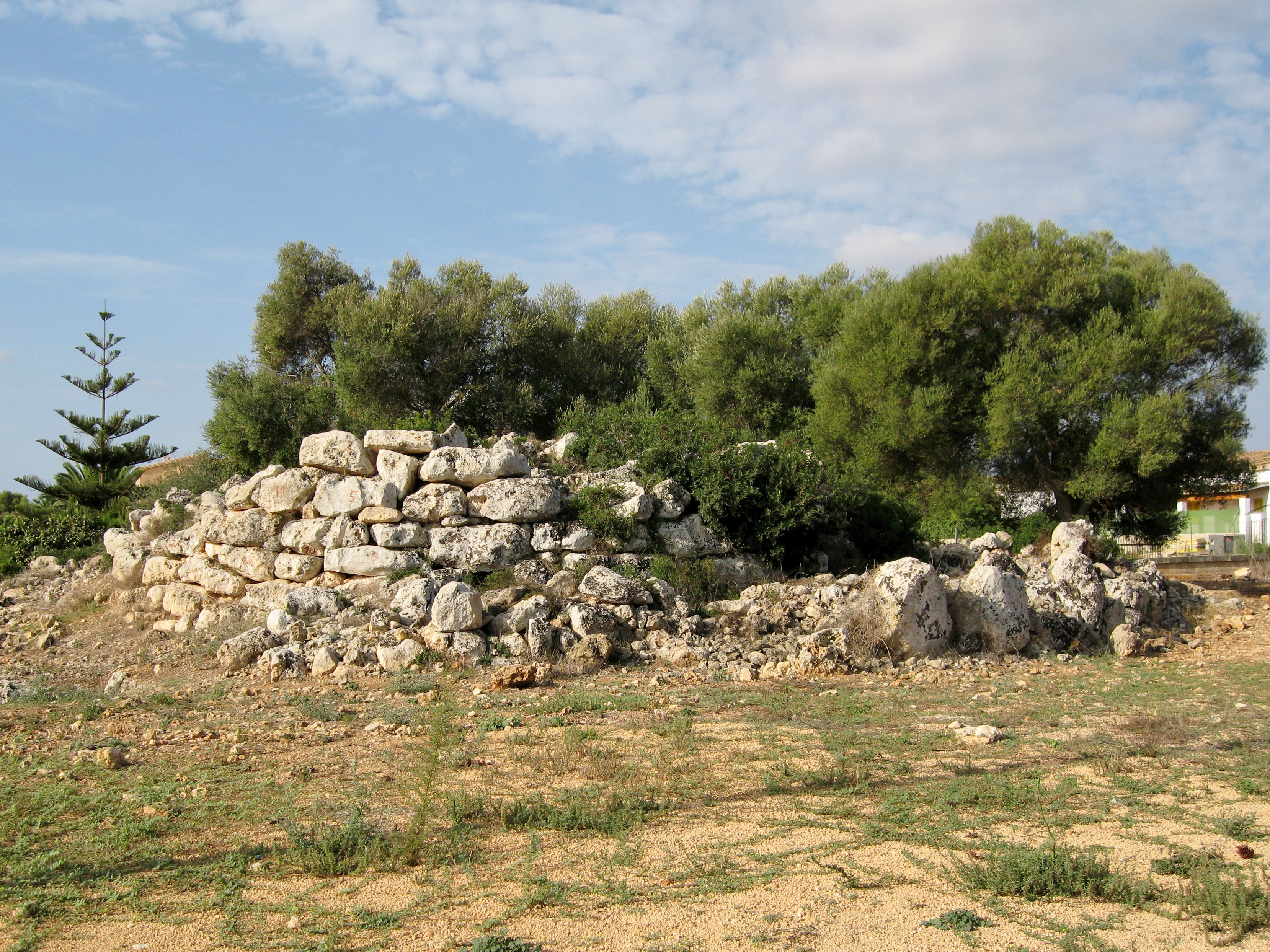 Talayot de na Pol, Sa Coma, Sant Llorenç des Cardassar, Mallorca, Spain